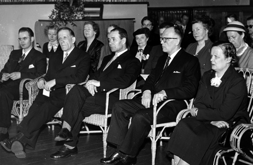 Sokeain Keskusliiton 25-vuotisjuhla 26.4.1953. Eturivissä vasemmalta jaostopäällikkö Eero Metsola, hallitusneuvos Aarne Tarasti, ministeri Lauri Murtomaa, opettaja Einar Juvonen ja rouva Kaija Juvonen.